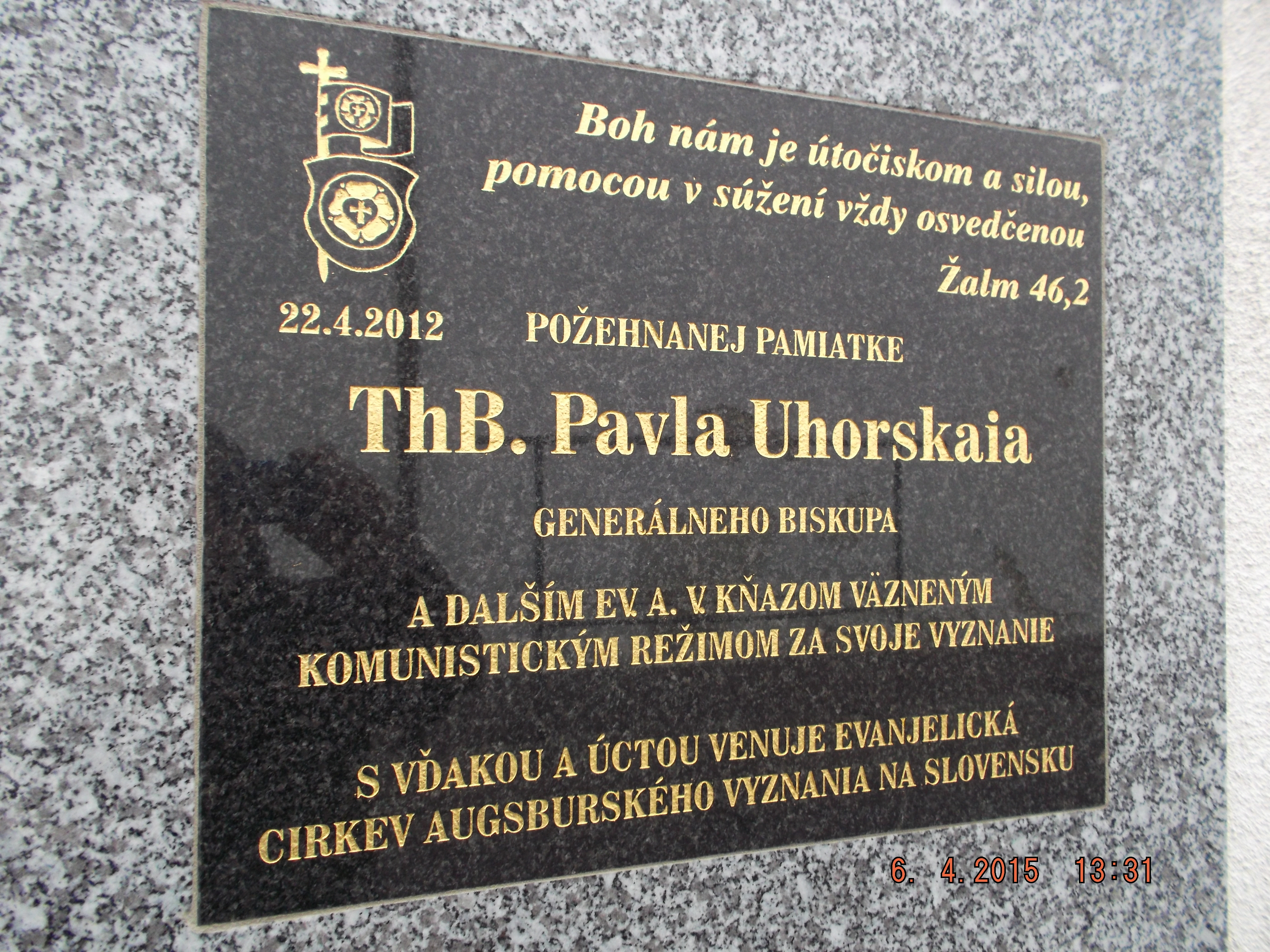 Pamätná tabuľa na múre ilavskej väznice